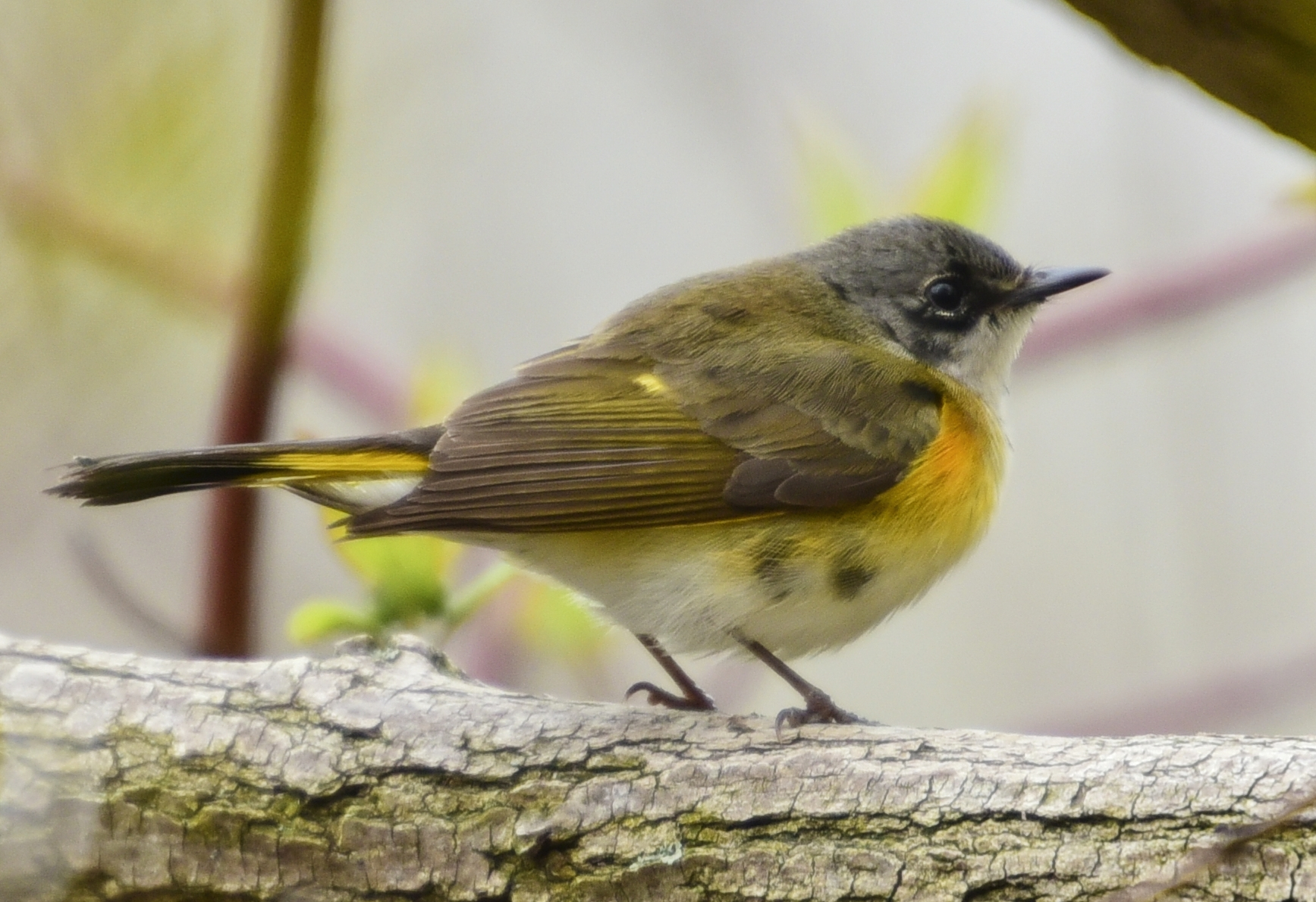 Самець пісняра горихвісткового (Setophaga ruticilla) 1-го літа у парку Томмі Томпсона в Торонто